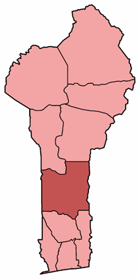 Mappa della diocesi di Dassa-Zoumé, nel Bénin. Lavoro personale, eseguito a partire da questa immagine di Commons. Fonte per i confini delle diocesi: Guida delle missioni cattoliche 2005, a cura della Congregatio pro gentium evangelizatione, Roma, Urbaniana University Press, 2005. Categoria:Chiesa cattolica in Benin